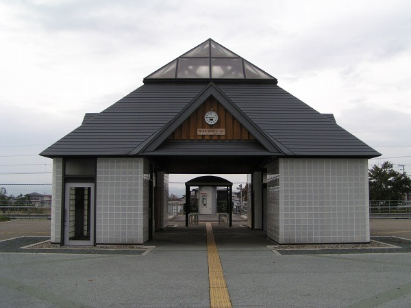 Minami-Dewa Station, Yamagata, Yamagata, Japan